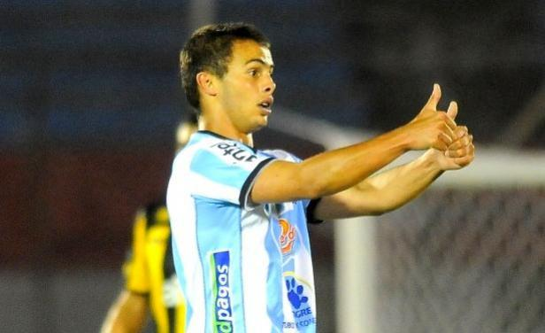 El dia del Gol vs Peñarol